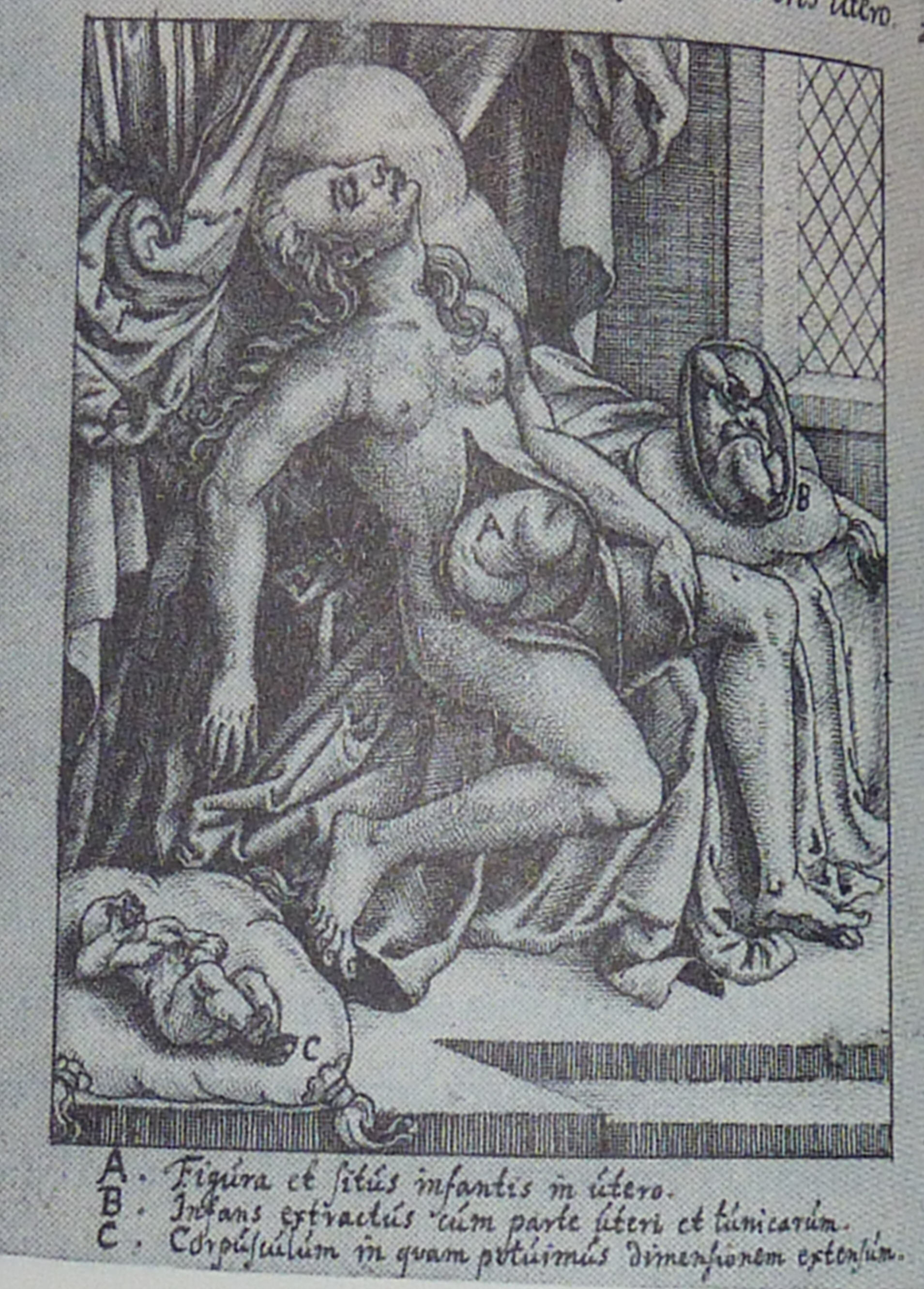 das Steinkind von Sens und seine Mutter